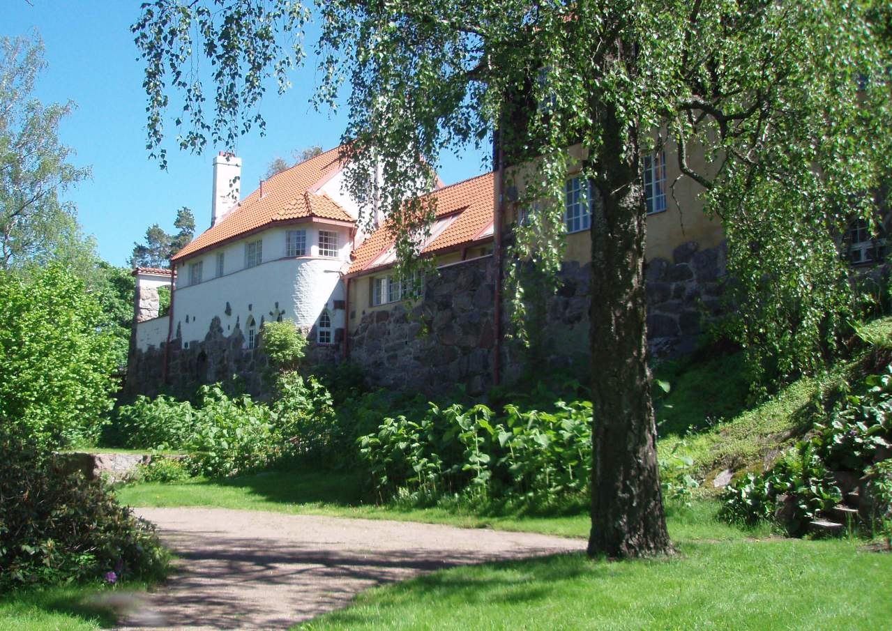 Hvitträsk, Kirkkonummi (Finland)